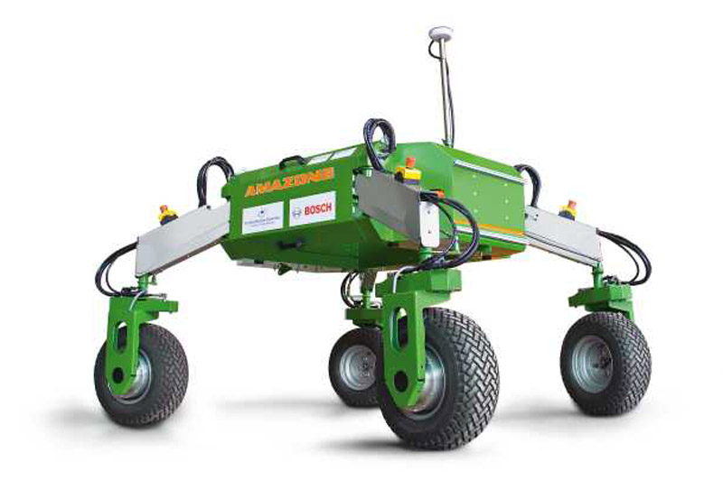 „BoniRob“ ist ein Modell eines autonomen Feldroboters (Forschungsprojekt) für das Einzelpflanzen-basierte Versuchswesen, der von Amazone zusammen mit der Fachhochschule Osnabrück, der Robert Bosch GmbH und anderen Partnern entwickelt wurde. BoniRob kann in Reihenkulturen die Einzelpflanzen automatisch erkennen, die Position speichern und eine Bonitur durch Messung spektraler, morphologischer oder mechanischer Signaturen durchführen und dokumentieren. Das System kann auf Basis der GPS-Position die Pflanzen wiederfinden und somit vollautomatisch eine Pflanzenbonitur bezogen auf eine Einzelpflanze durchführen.